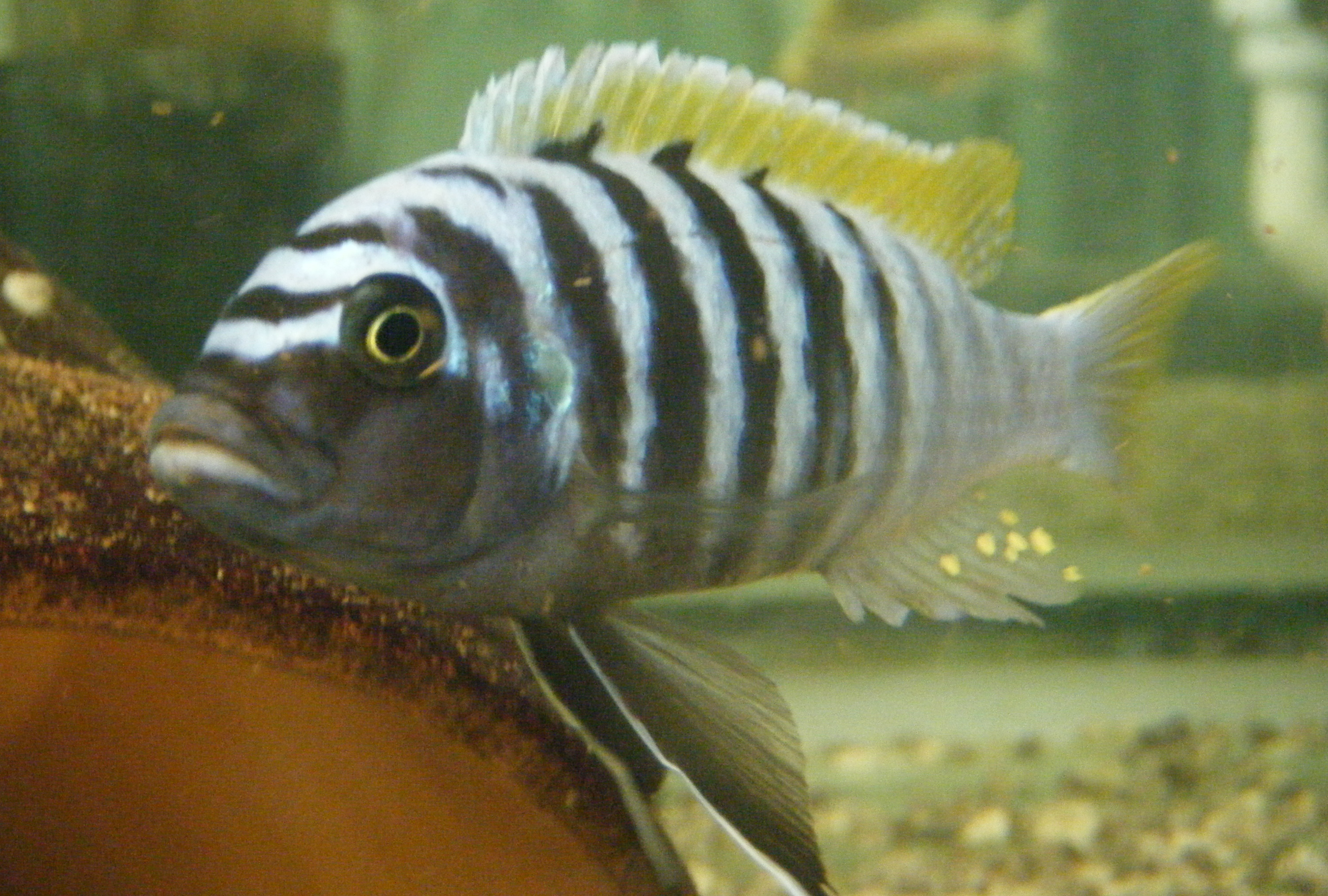 Maylandia pyrsonotus, wild caught male (Nakantenga Island)